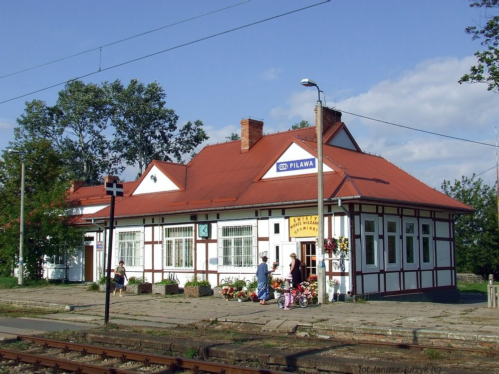 Pilawa